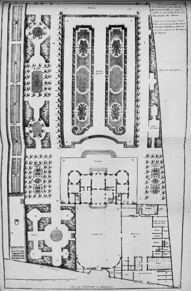 Plan général des jardins de l'hôtel bâti pour Abraham Peyrenc de Moras entre 1727 et 1731